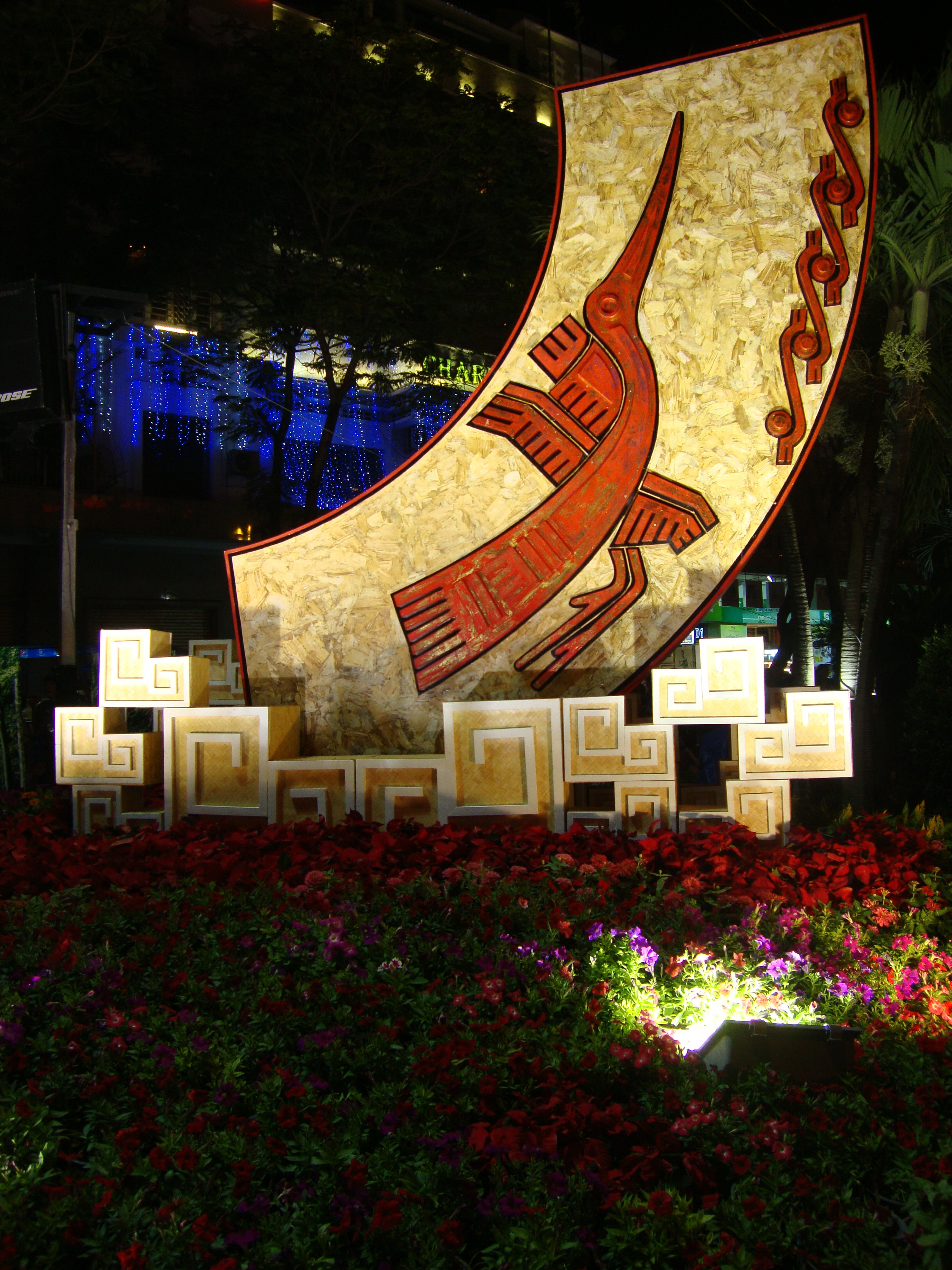 Một trong hai hình tượng Chim lạc tại đầu đường hoa Nguyễn Huệ, Tết Nhâm Thìn